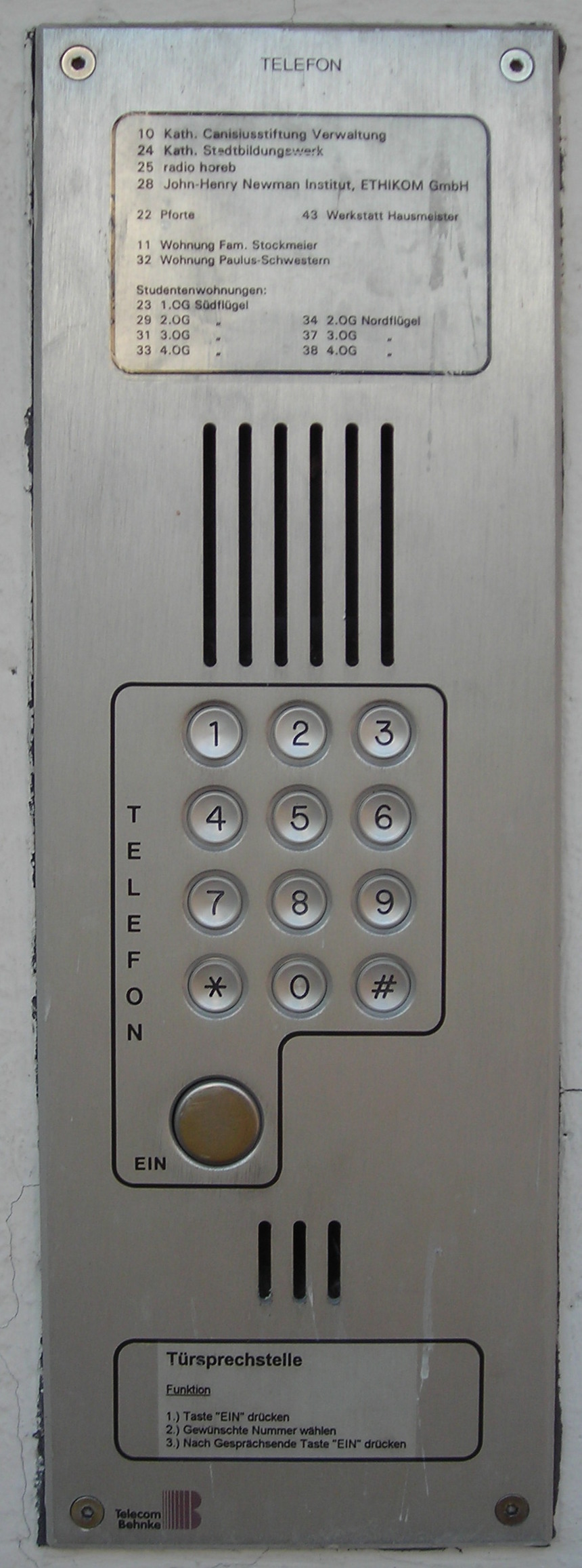 Türsprechstelle, Hersteller: Telecom Behnke